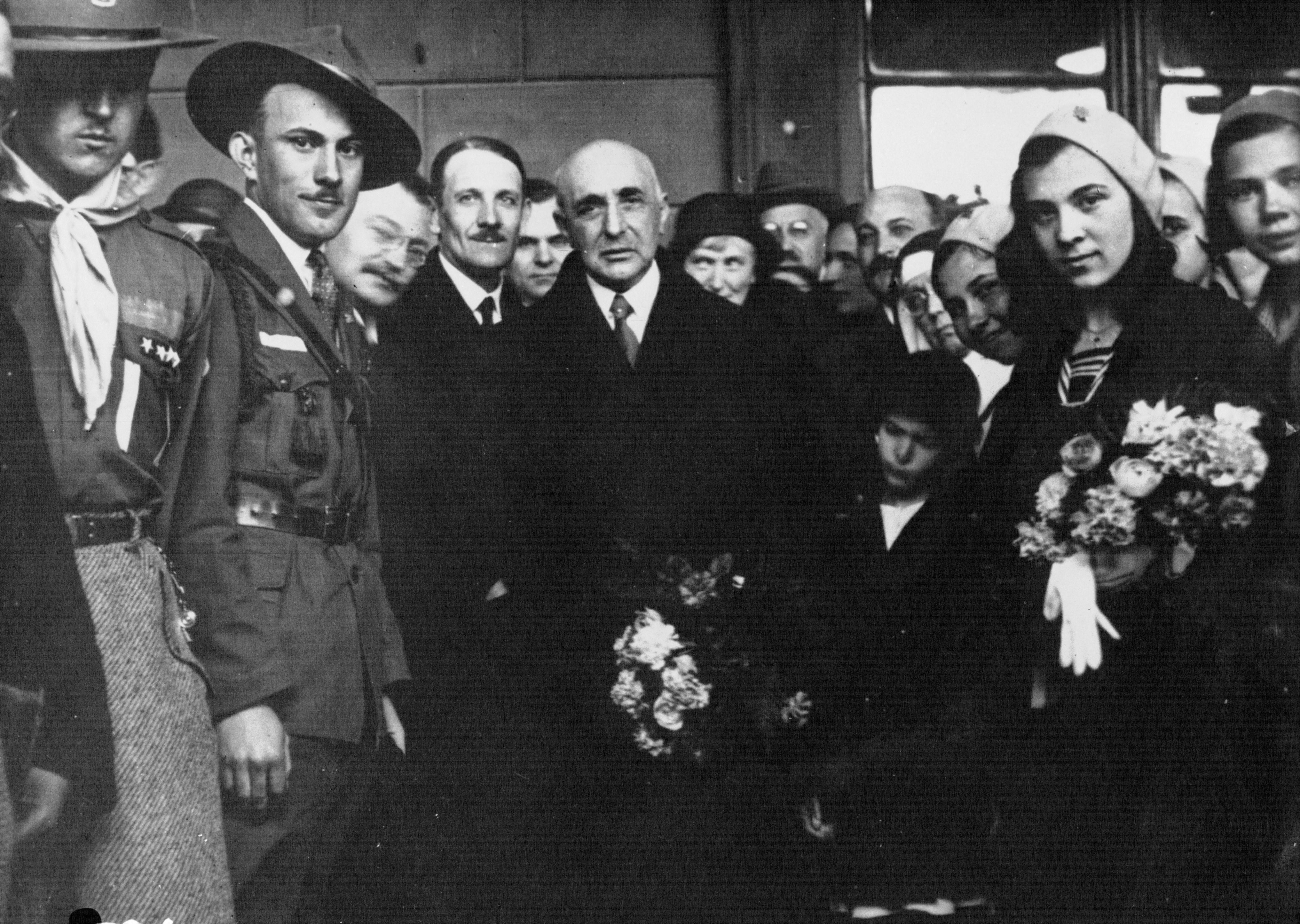 M. Emile Dard, ministre de France quitte Belgrade [photographie de presse]